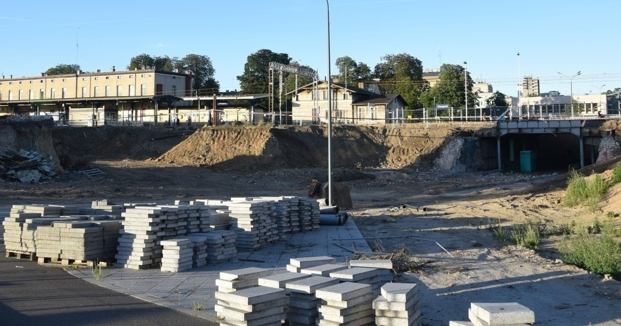 Stargard. Przebudowa wiaduktu